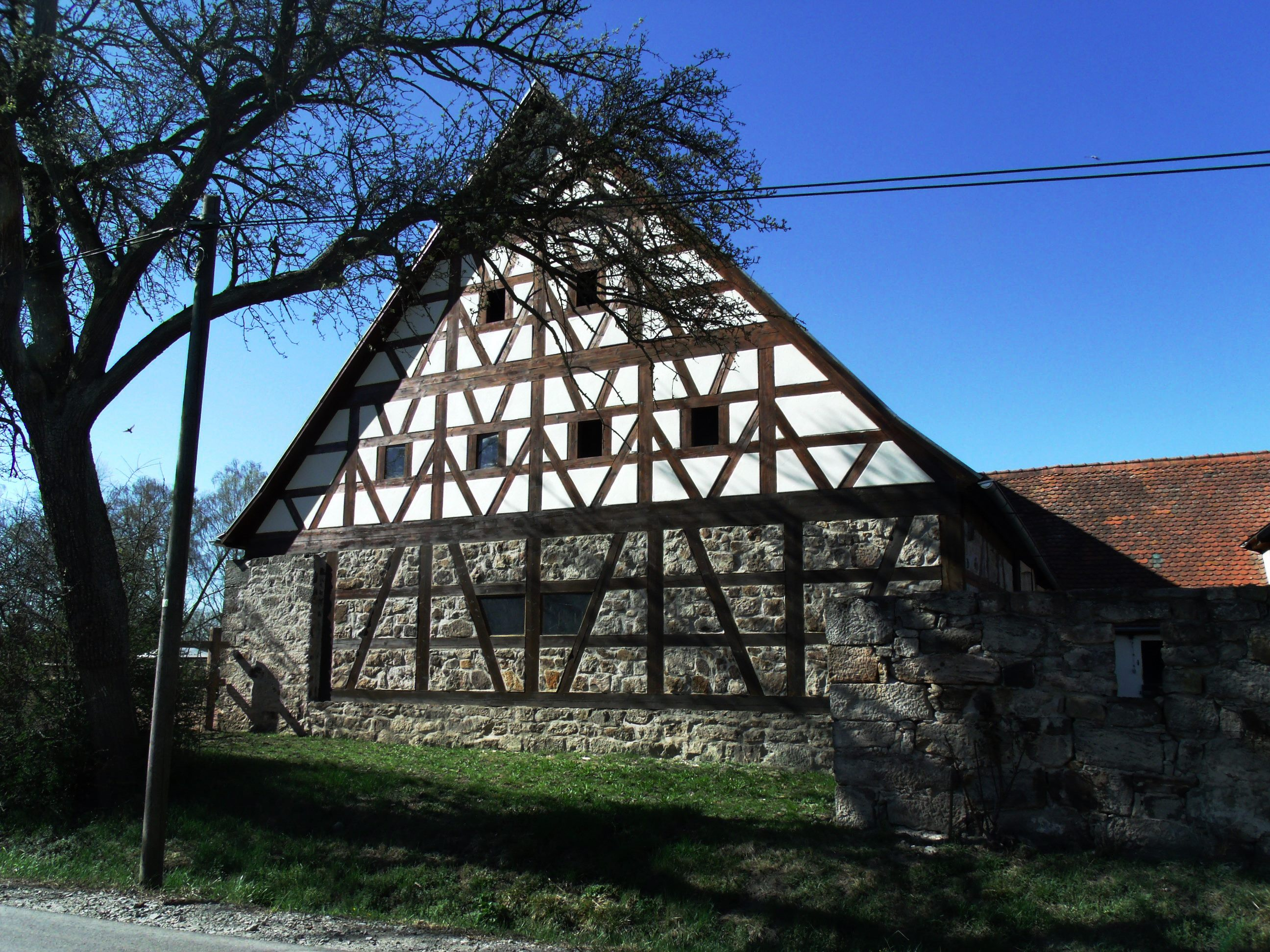 Atzenhofen, Ortsteil von Leutershausen im Landkreis Ansbach, Fachwerkscheune